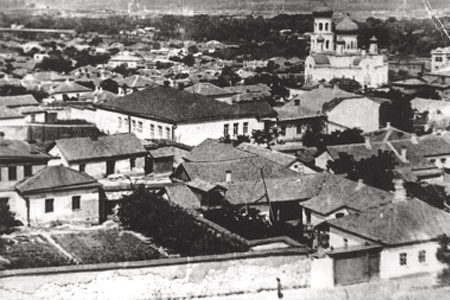 Казанская церковь и панорама Луганска